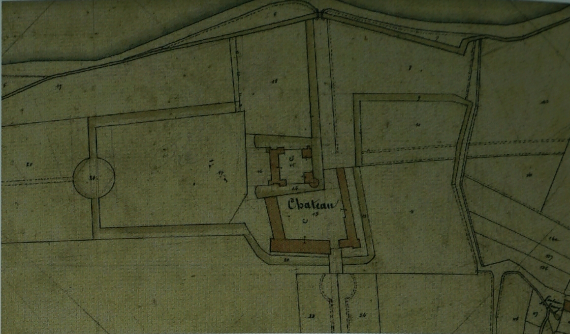 chateau de villemereuils sur le cadastre de 1829